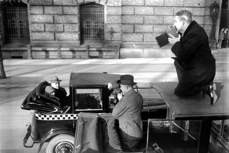 Zeitungsphotograf bei der Arbeit Der Beruf des Zeitungsfotografen ist einer der anspannensten, sowie aber auch interessantesten seiner Art. Stets mit der Kamera bewaffnet ist er ständig auf der Suche nach interessanten Objekten, um für den Leser wichtige Geschehnisse im Bilde, festzuhalten. Man findet den modernen Zeitungsfotografen überall, sei es zu wichtigen politischen Weltereignissen oder zu Geheimbesprechnungen großer Wirtschaftsführer, oder Ereignissen lokaler Natur stets wird er dabei sein mit den modernsten Apparaten der Neuzeit ausgerüstet bis zur Geheim-Aufnahme-Kamera. Ist die Aufnahme fertiggestellt, was oft unter größten Schwierigkeiten geschieht, so ist der schnelle Transport der Fotografien zur Redaktion seine zweite wichtige Aufgabe. Er benutzt zur schnellen Beförderung derselben die modernsten Verkehrsmittel wie Flugzeug, Auto, Expresszüge usw., ständig muß er auch vor seinen Konkurrenten auf der Hut sein , um nicht von denselben geschlagen zu werden. -Der Zeitungsphotograph bei der Verfolgung wichtiger Persönlichkeiten im Auto, welche er unbedingt auf die Platte haben muß. Ständig neben dem Automobil seines Objektes daherfahrend versucht er seine Zeitungsaufnahme zu machen.